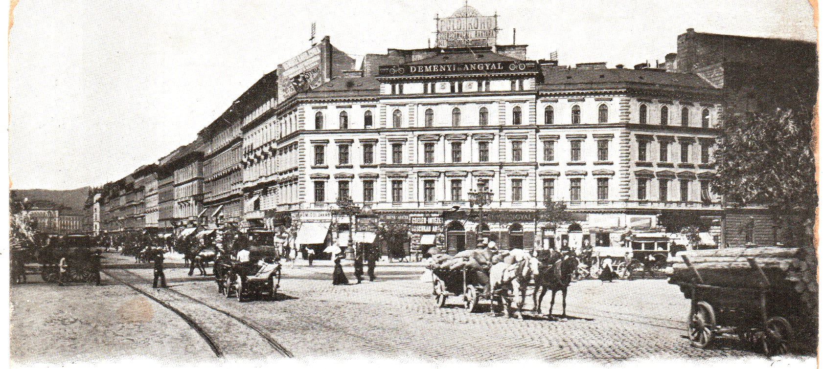 A képes levelezőlap hátoldalán (3) a postai bélyegző szerint 1913. augusztus 13 -án adták postára a budapesti 3. számú postahivatalban. A képeslap “Tisztelt Horváth György Ifi Urnak “Széchényi tér 18, Szoprony” van címezve. A lapot a soproni 1 számú postahivatal augusztus 14 -én bélyegezte le. Az épületeken levő reklámtáblák: “Cseléd Intézet”, “Deményi és Angyal”, Polói Kohó Szerszámacél raktára.